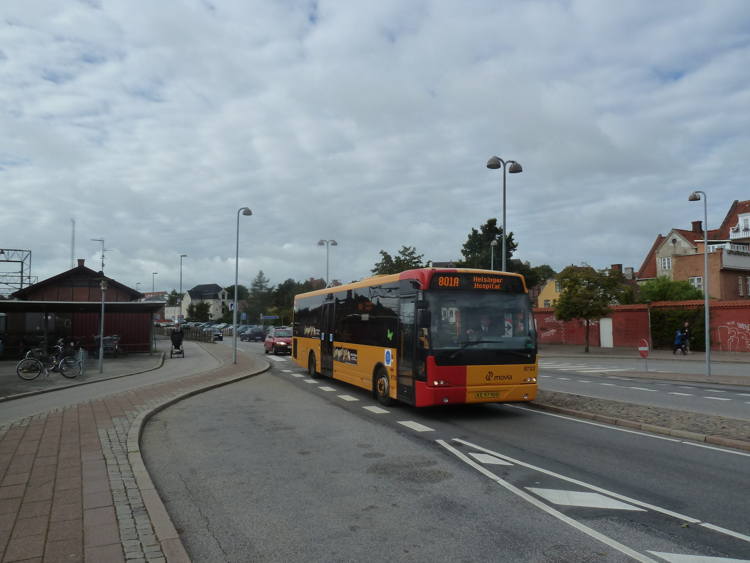 Bus line 801A at Helsingør Station.